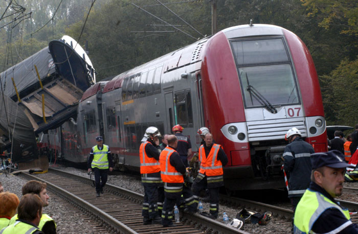 6 Tote bei einem Zugunglück in Zoufftgen, eine Regionalbahn kollidierte mit einem Güterzug.